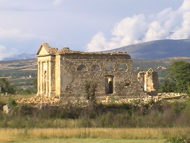 Црква Покрова Пресвете Богородице у Кричкама.